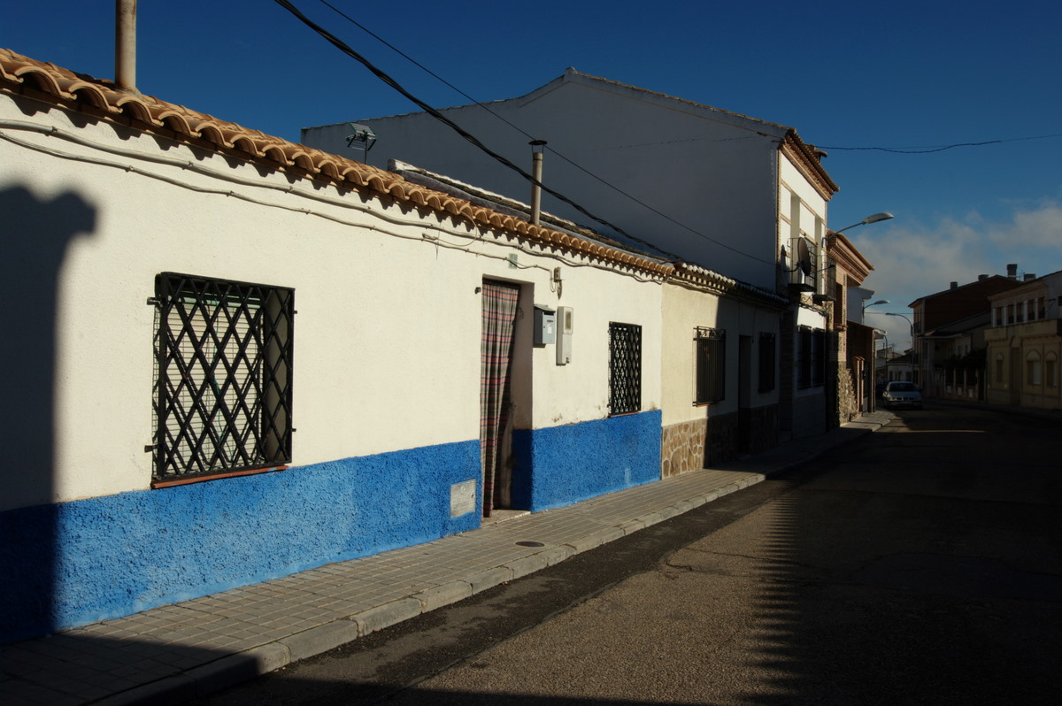 Casas en el municipio de Olías del Rey, Toledo, España.